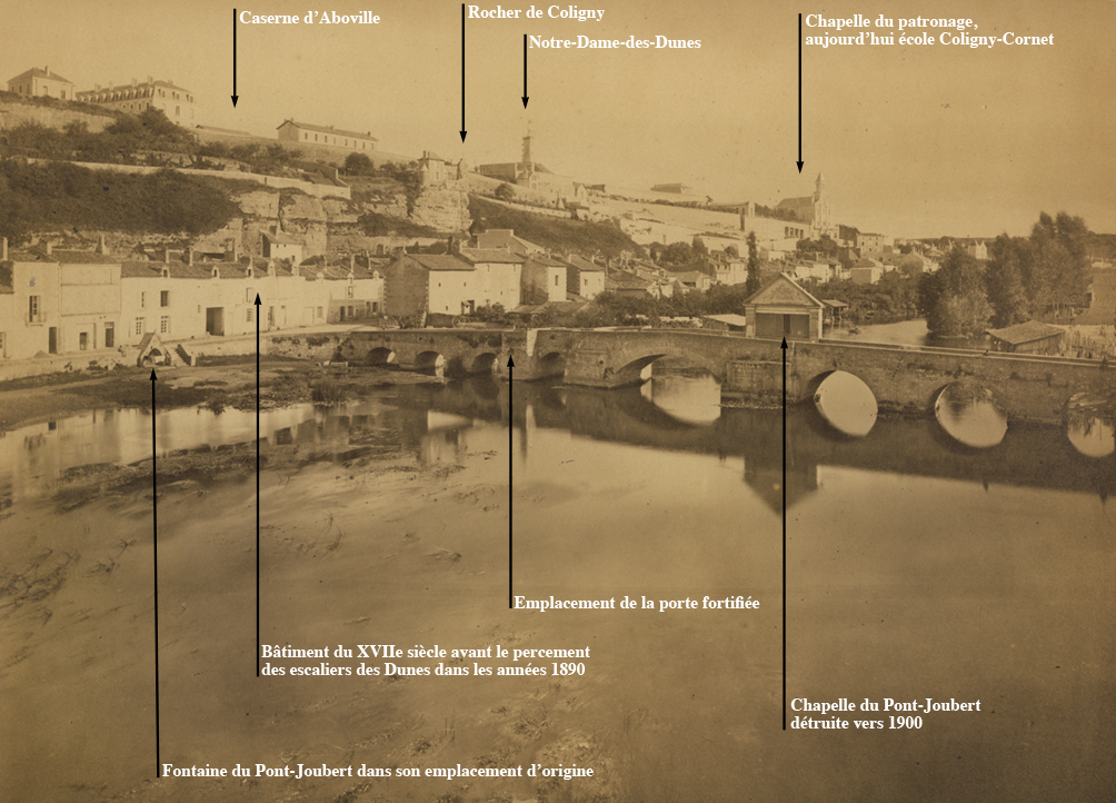 Photo du XIXe siècle montrant le Pont-Joubert de Poitiers, avec descriptif.